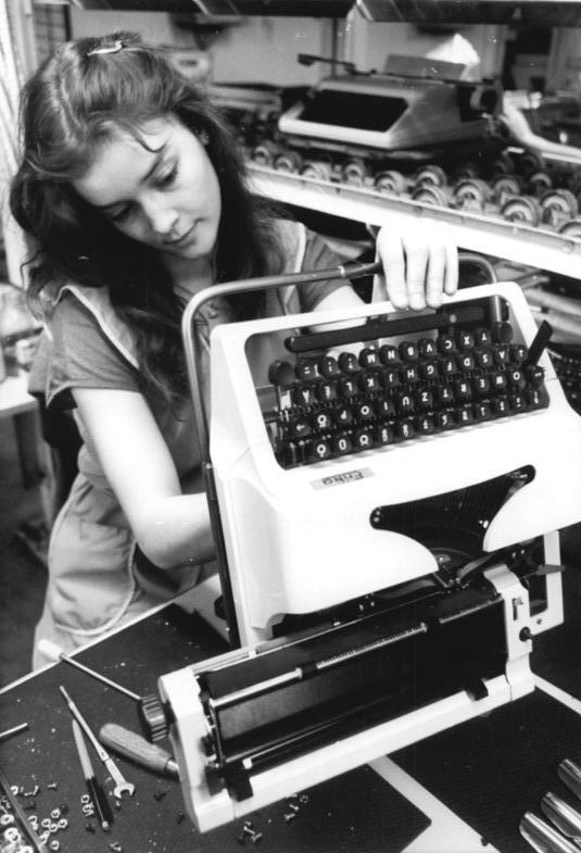 VEB Robotron Elektronik Dresden, Endmontage ADN-ZB Häßler 25.1.87 Dresden: Plan- Im Kombinat Robotron beteiligten sich an diesem Wochenende rund 17.000 Werktätige an Sonderschichten. Die Kollektive im Stammbetrieb wollten insbesondere Rückstände in der Fertigung von Schreibtechnik auf. Petra Körner gab ihr Bestes in der Endmontage.